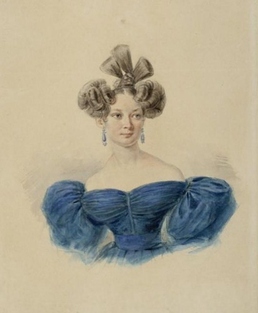 Екатерина Александровна Тимашёва, ур. Загряжская (1798—1881)